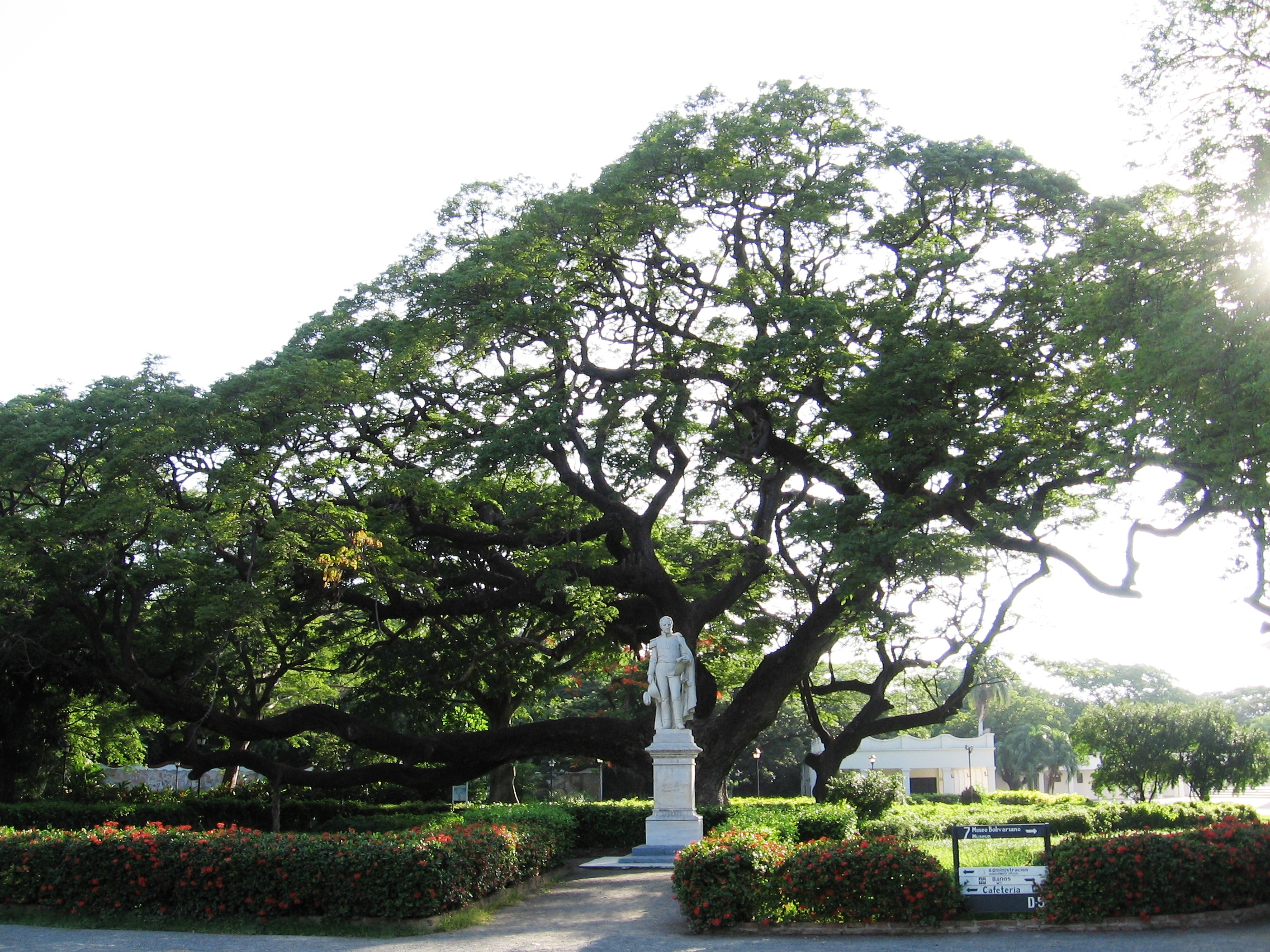 Statue of Simon Bolivar at Quinta de San Pedro Alejandrino, in Santa Marta, Colombia.